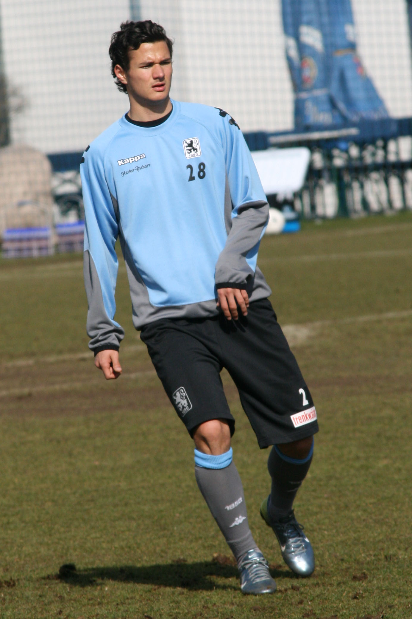 Alexander Eberlein, player of TSV 1860 München, training, 11.03.2007, Grünwalder Str., Munich